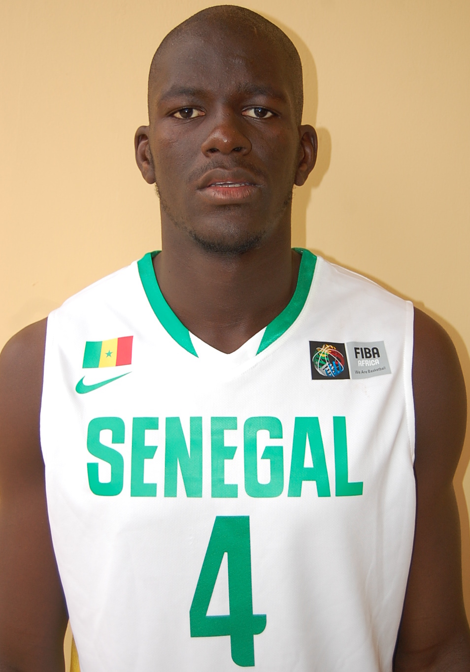 MADAGASCAR:AFROBASKET MEN 2011 EL HADJI MALICK NDIAYE SENEGAL